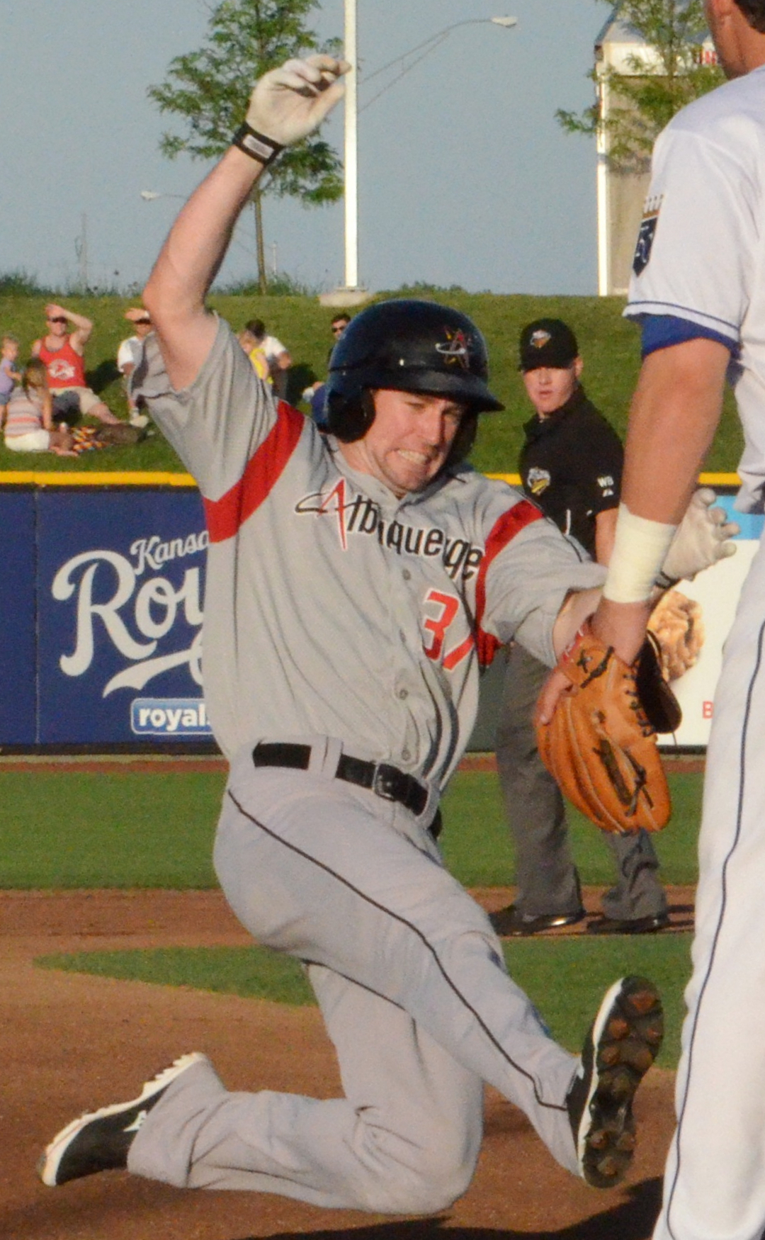 Mike Baxter